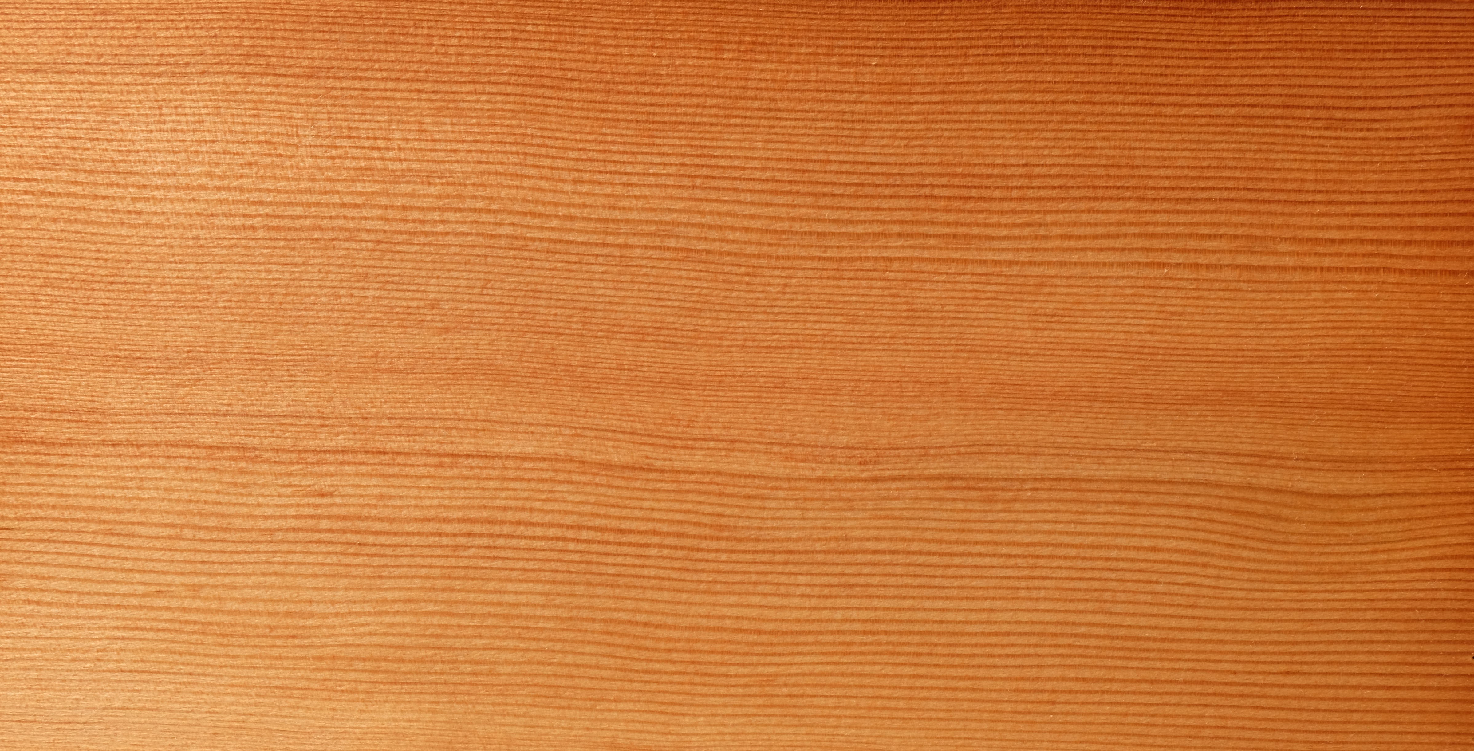 gemessertes Furnier der Douglasie, geölt, nicht geschliffen